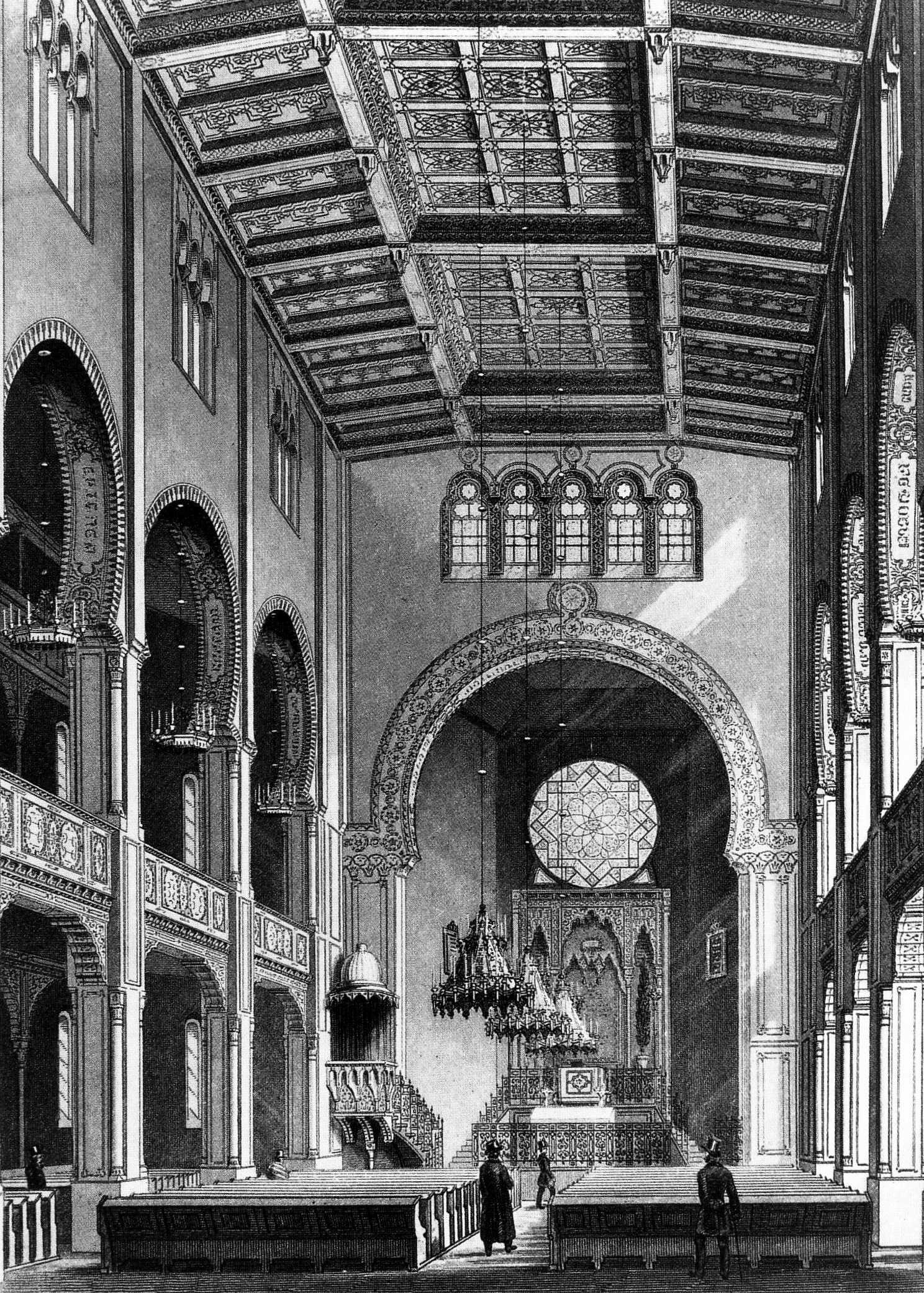 Synagoge Leipzig (synagogue of Leipzig)